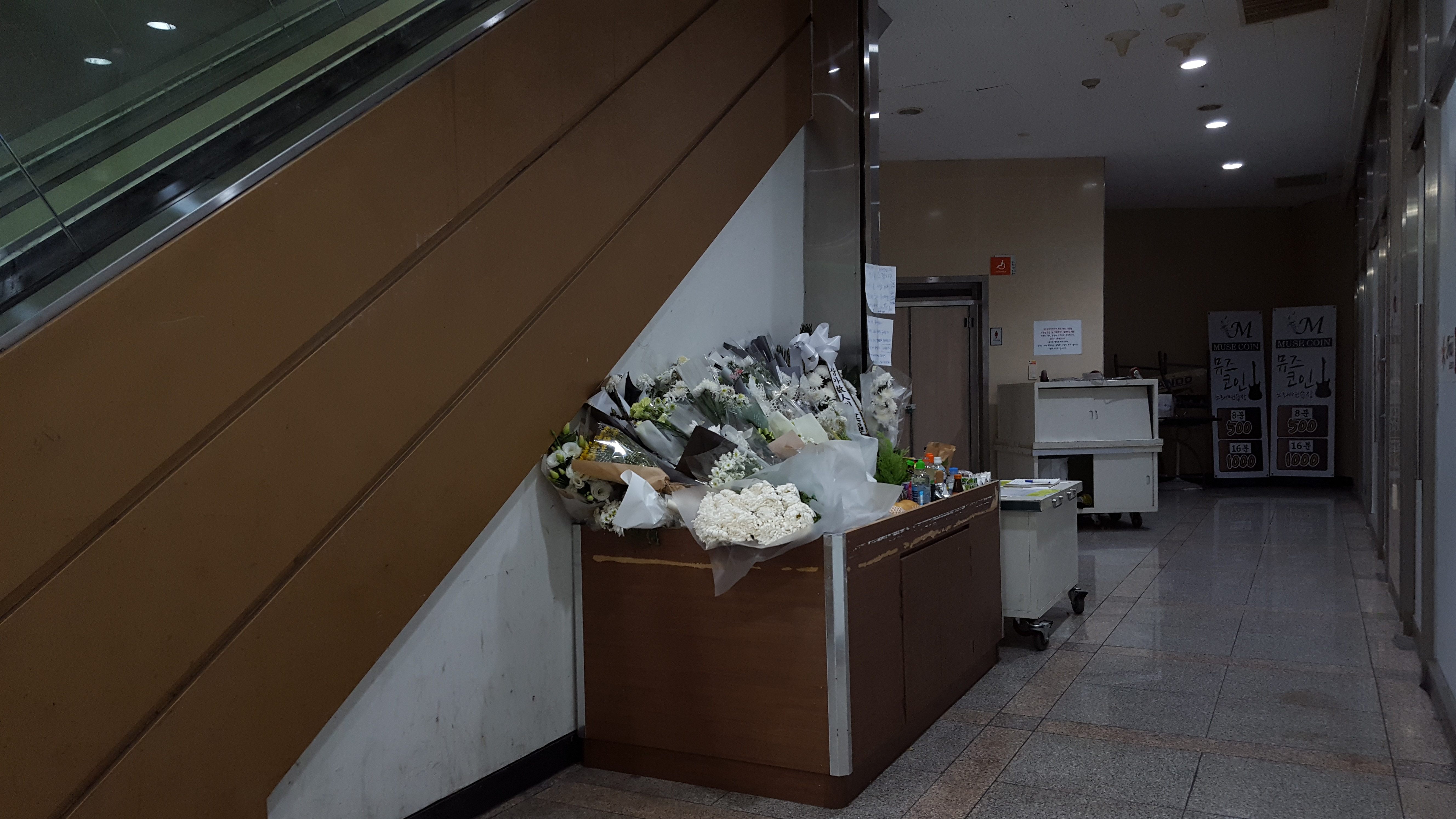 서울 강서구 PC방 살인사건이 발생한 장소 앞에 희생자를 추모하기위해 가져다 놓은 꽃 등이 있다.